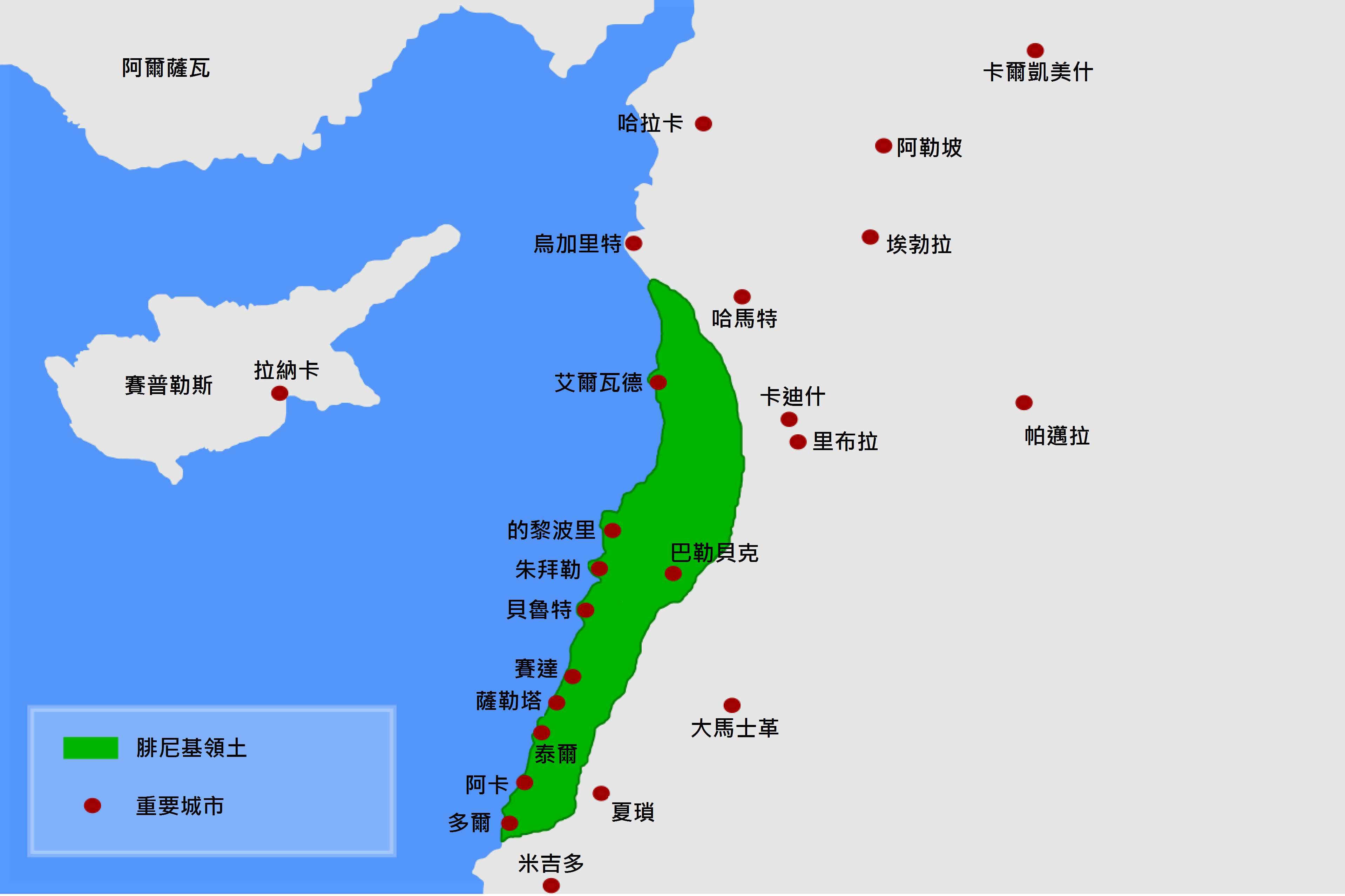 腓尼基地圖